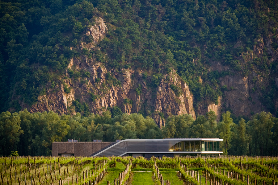 FX Pichler Kellergebäude, Ober Loiben, Wachau